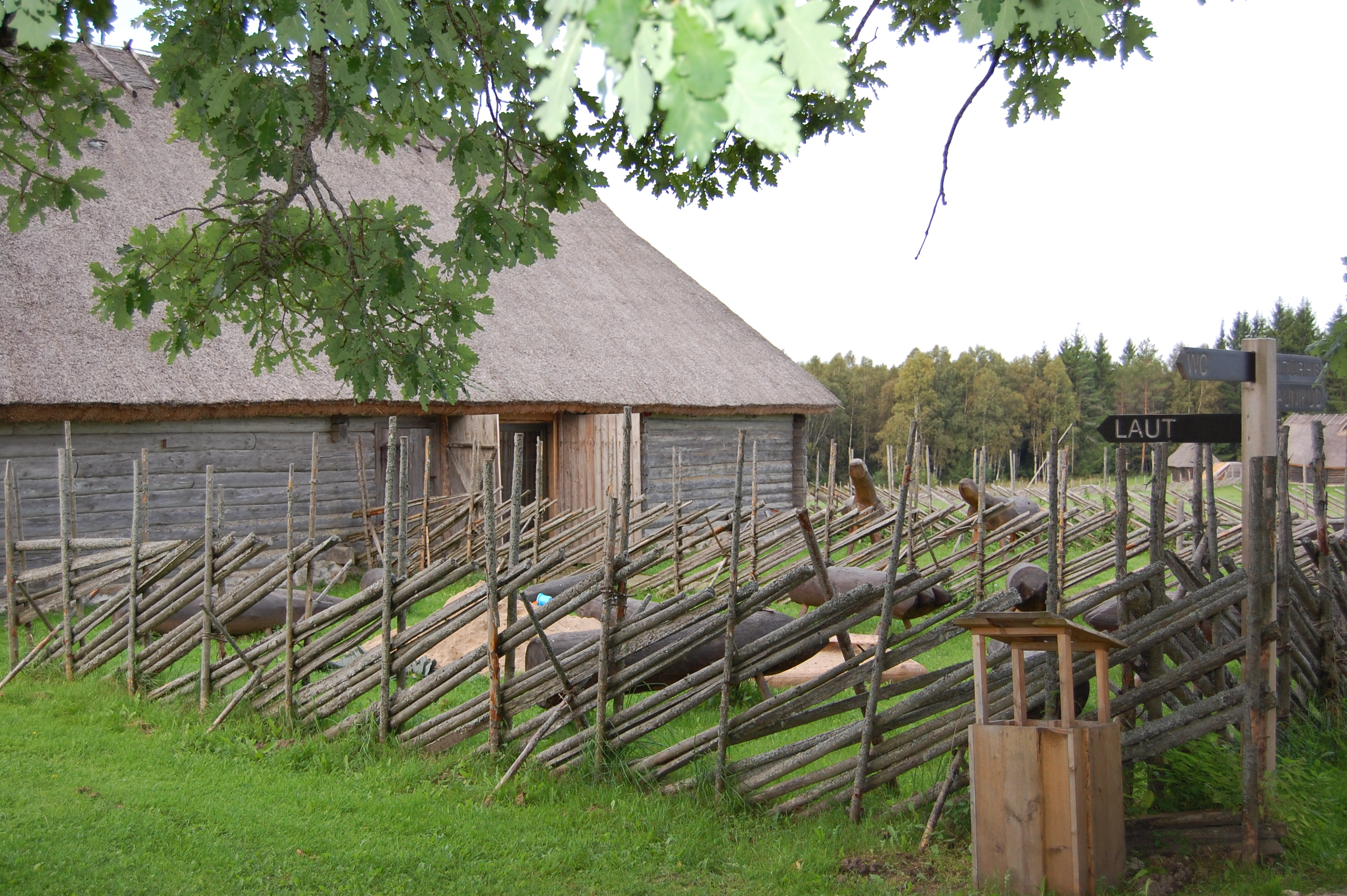 Anton Hansen Tammsaare sünnikodus